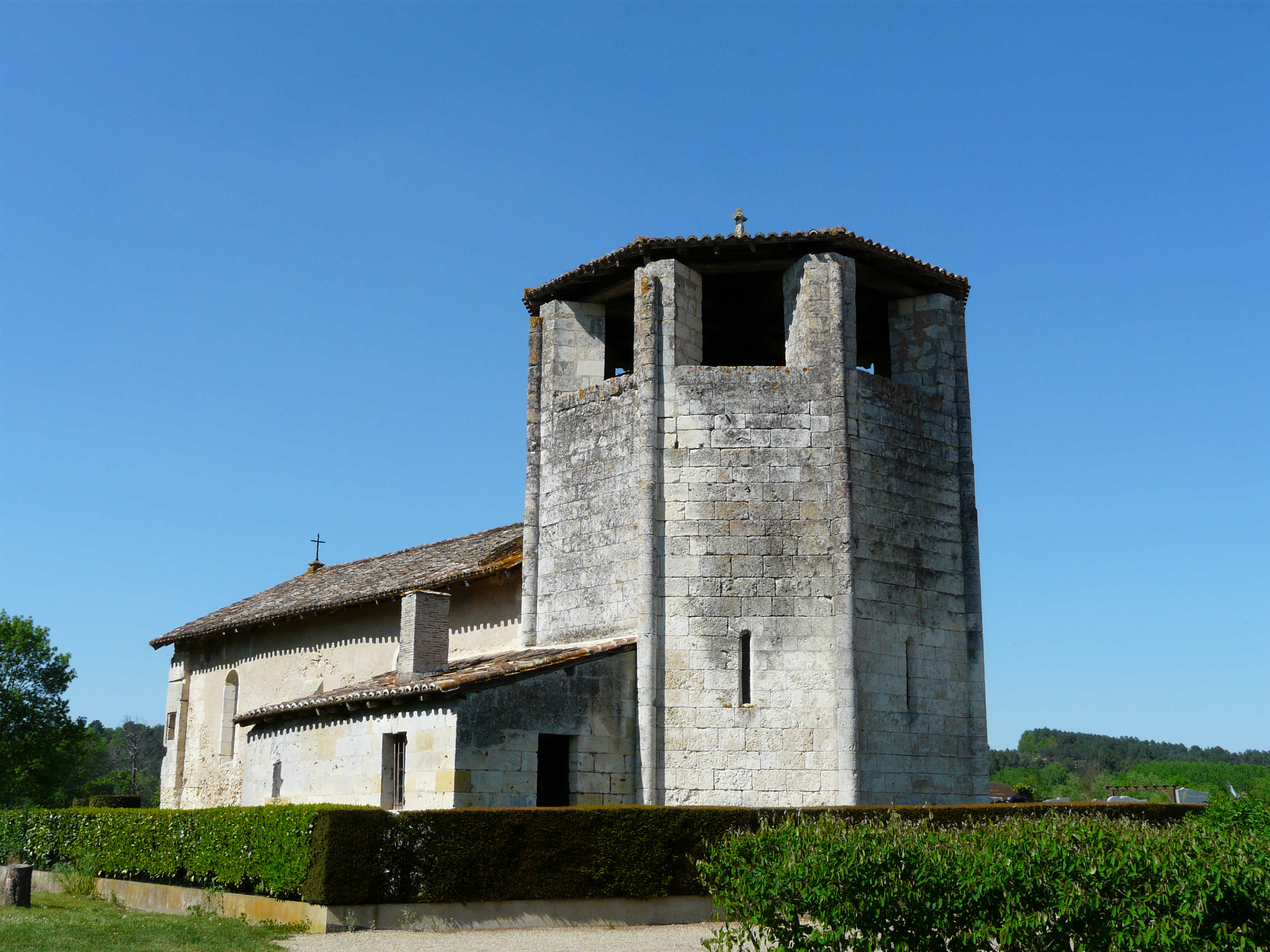 L'église Saint-Martin vue du sud-est, Saint-Martin-l'Astier, Dordogne, France.